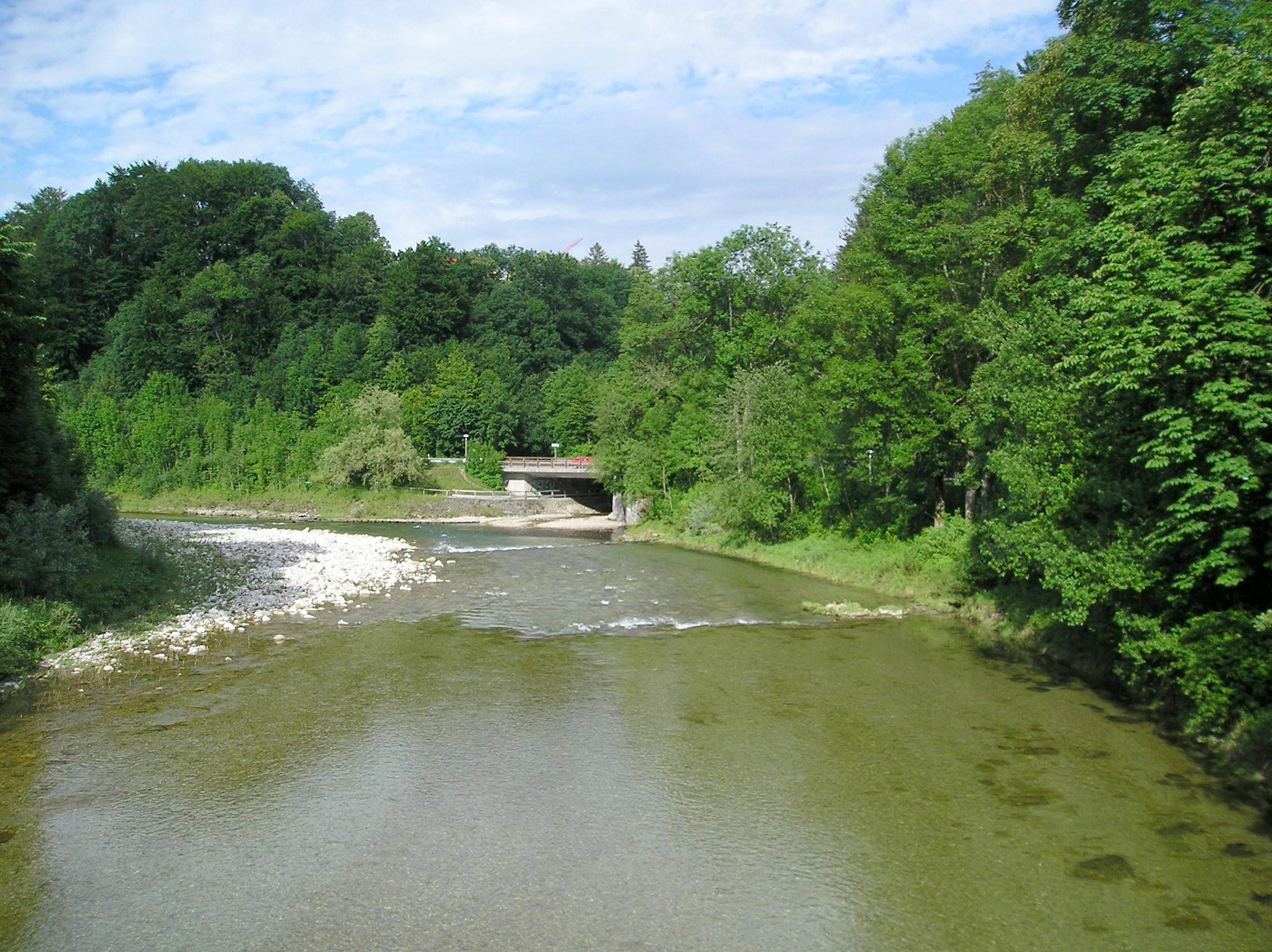 Bildbeschreibung: Der Fluss "Traun" bei Traunstein Fotograf: Mons Maenalus Datum: 2005 Sonstiges: nix